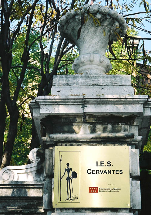 Portada del "Instituto de Bachillerato Cervantes" en Madrid. Se encuentra en la Glorieta de Embajadores. Fotografía en papel con cámara analógica.